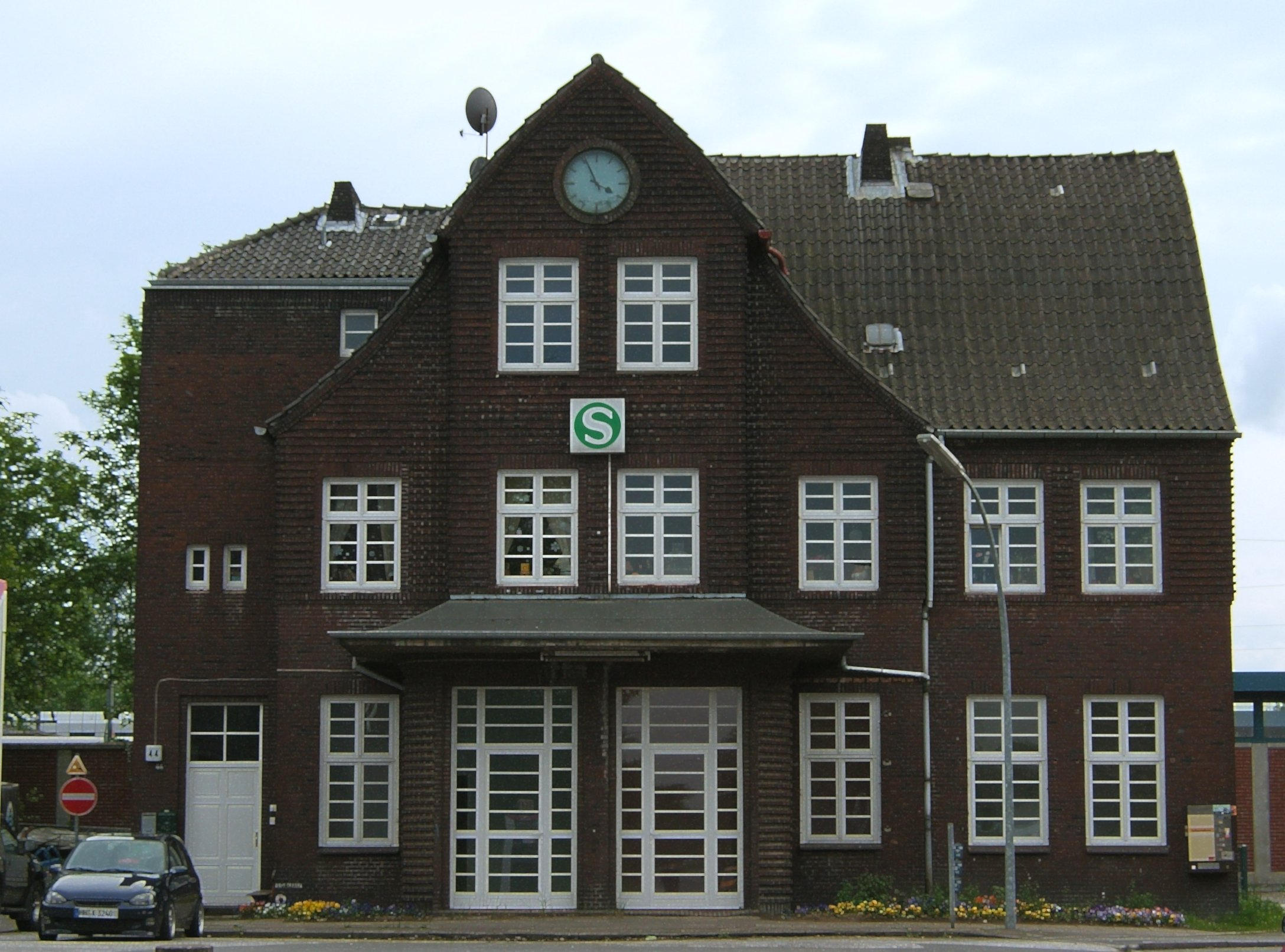 Bahnhofsgebäude der S-Bahnstation Billwerder-Moorfleet in Billwerder.